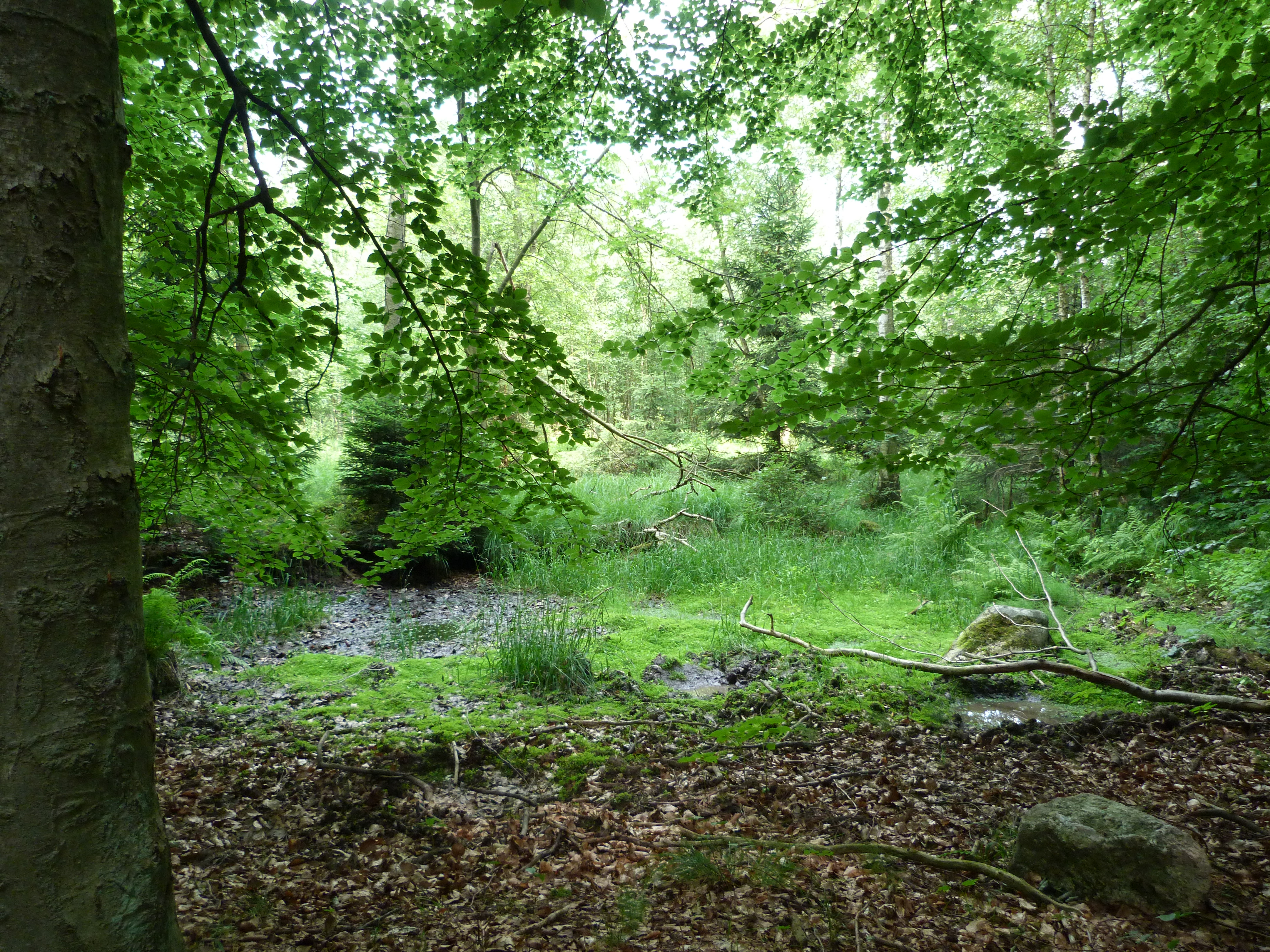 Das Schönwolder Moor liegt direkt an einer kleinen Feldstraße in einem Mischwald. Zahlreiche seltene Pflanzen wachsen hier noch ungestört.